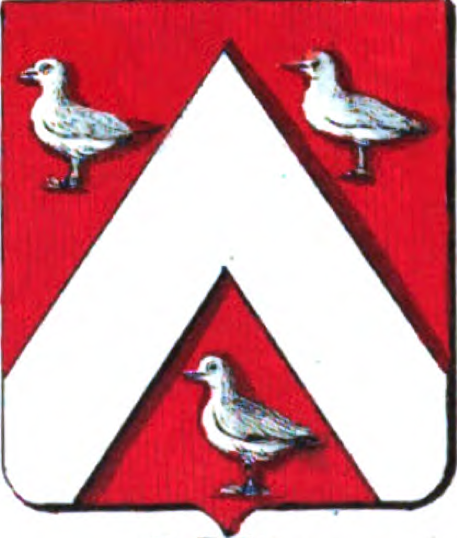 De gueules, à un chevron d'argent, accompagné de trois mouettes de même.